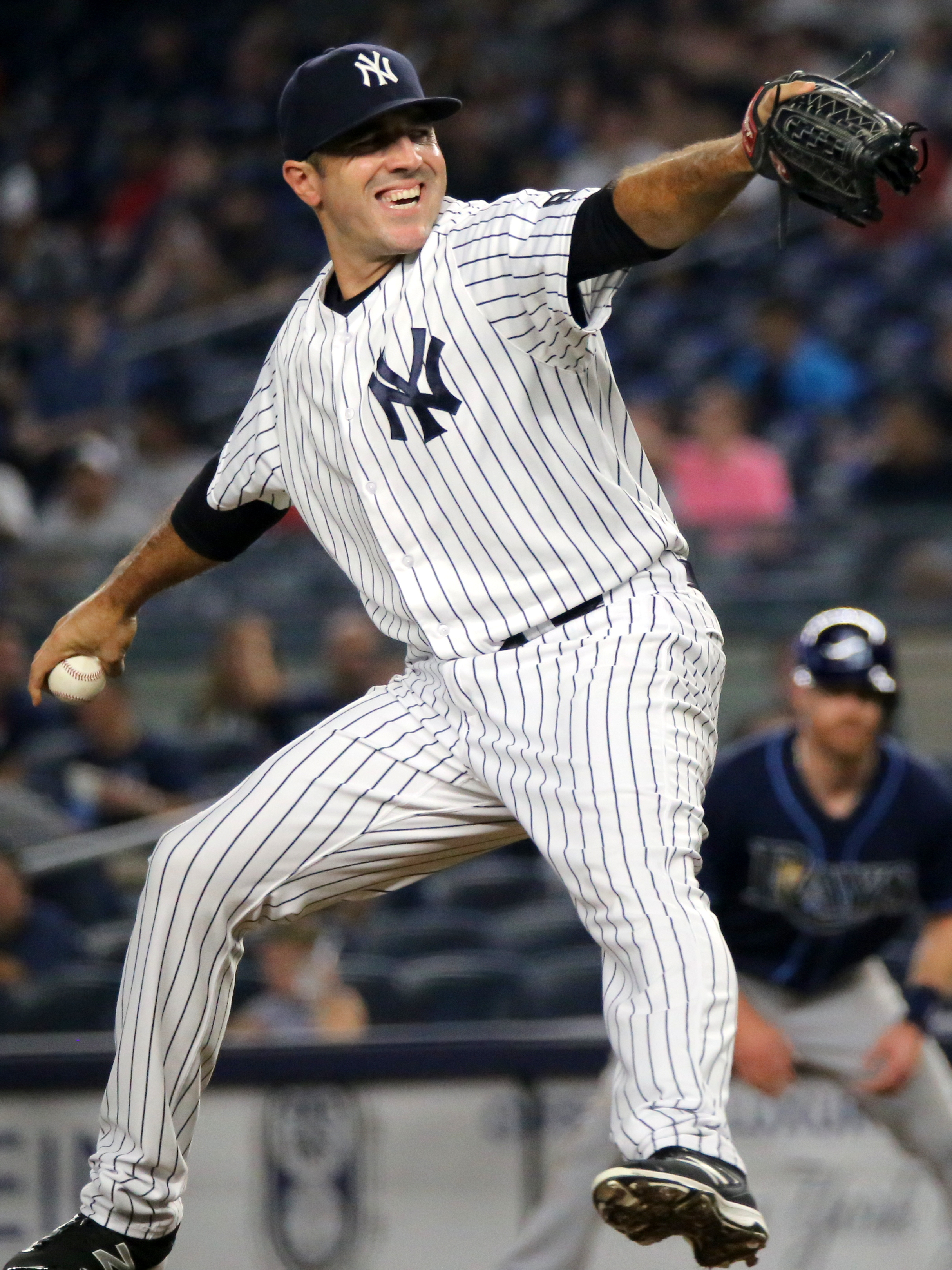 Blake Parker